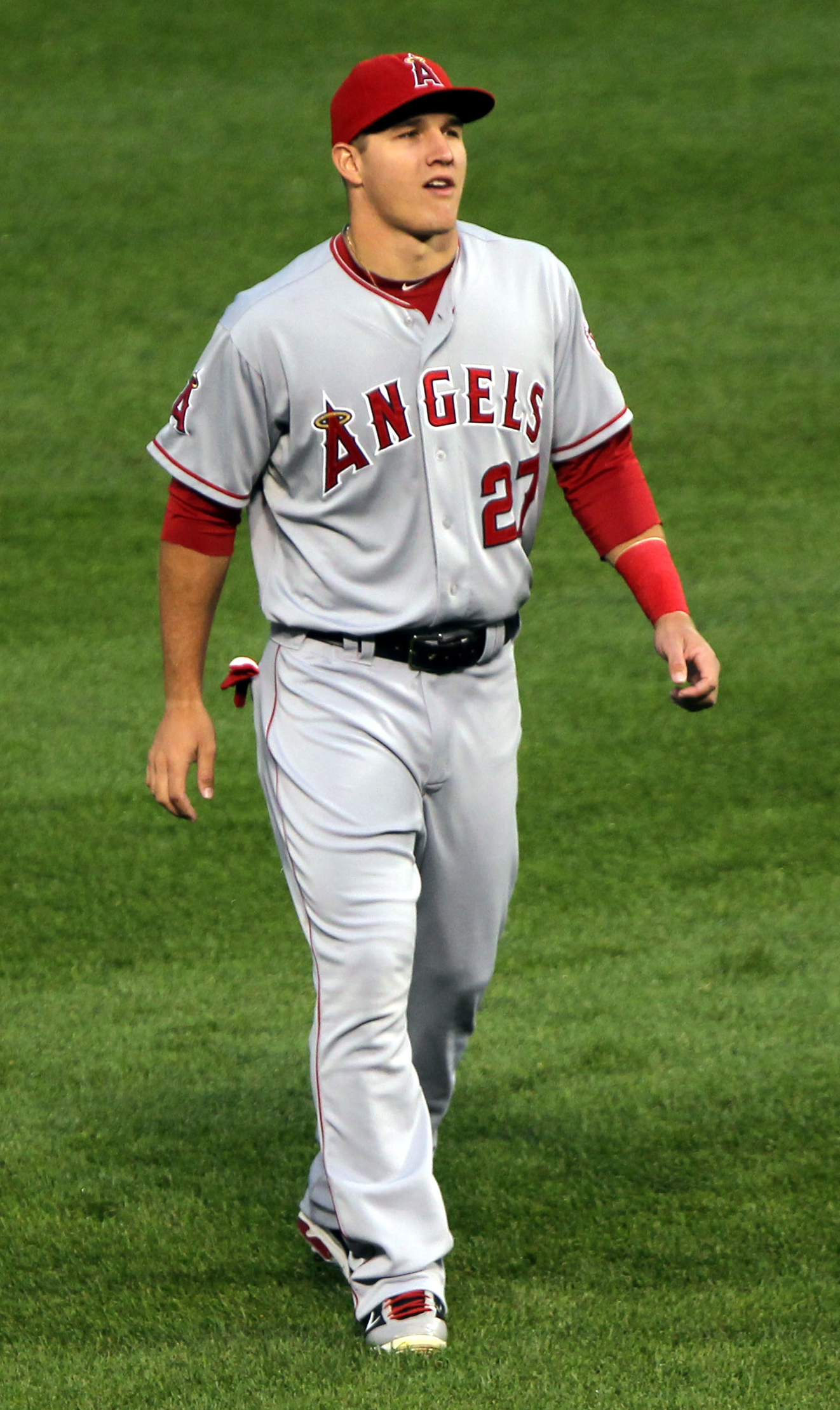 Angels at Orioles September 17, 2011